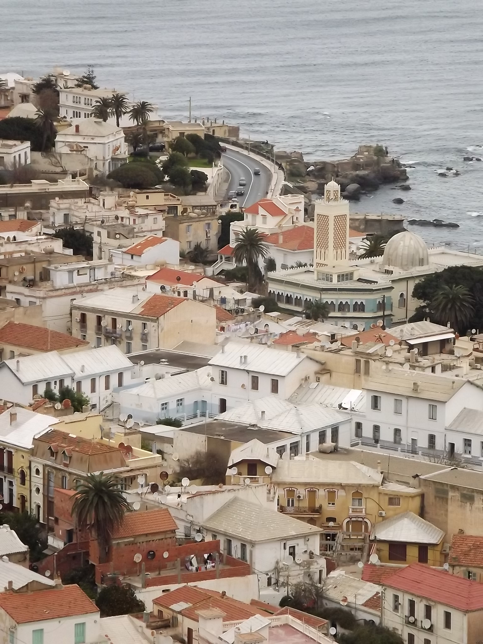 Bologhine